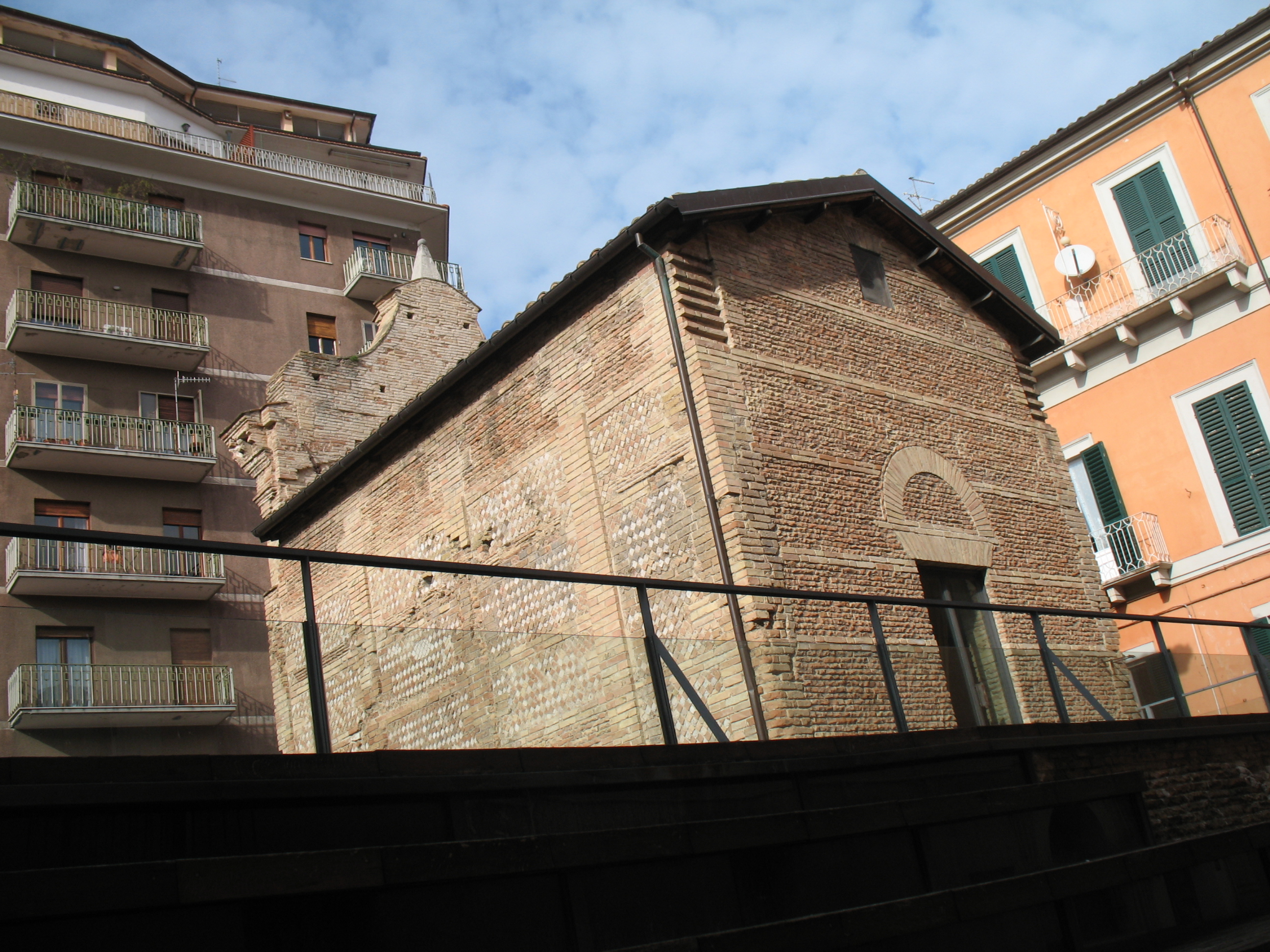 Scorcio dei Templi Romani di Chieti